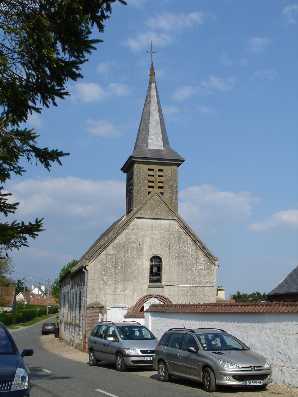 Église de Lépine